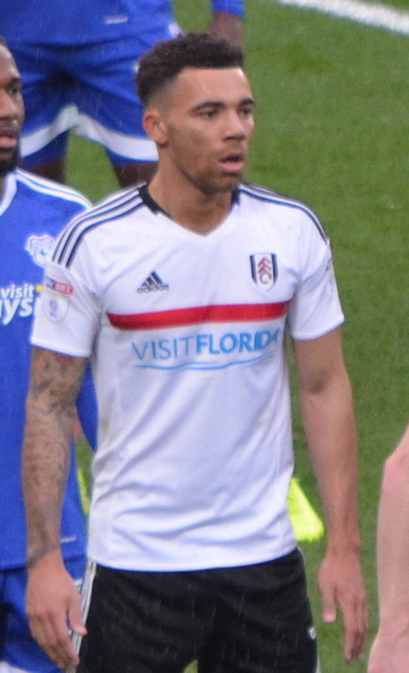 Cardiff v Fulham